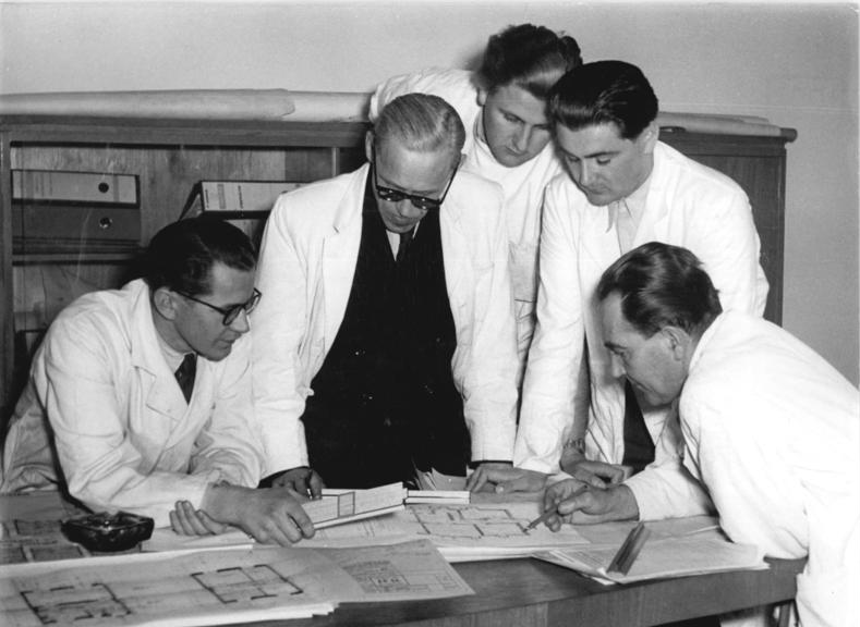 Architekten mit Bauplänen Zentralbild Weiss 7 Motive 13.4.1954 14 Typen für Eigenheime festgelegt Das Ministerium für Aufbau hilft mit, die Ministerratsverordnung vom 10.12.53 zu verwirklichen Im Entwurfsbüro für Typierung beim Ninisterium für Aufbau wurde die Ausarbeitung baureifer Typen aus den verschiedensten Ideenskizzen für Eigenheimbauten beendet. Nach Aussprache mit Vertretern der Bauakademie, des PDGB und mit Werktätigen aus Großbetrieben wurden 14 Typen festgelegt. Es handelt sich um Einzel-Doppel- und auch Reihenhäuser. UBz: Mitarbeiter des Entwurfsbüros für Typierung bei einer Arbeitsbesprechung. Von links nach rechts: Architekt Hafenmeister, Architekt Rödel, Techniker Beckmann, Architekt Stallknecht und Dipl. Ing. Müller. Leihweise Zentral Bihr x